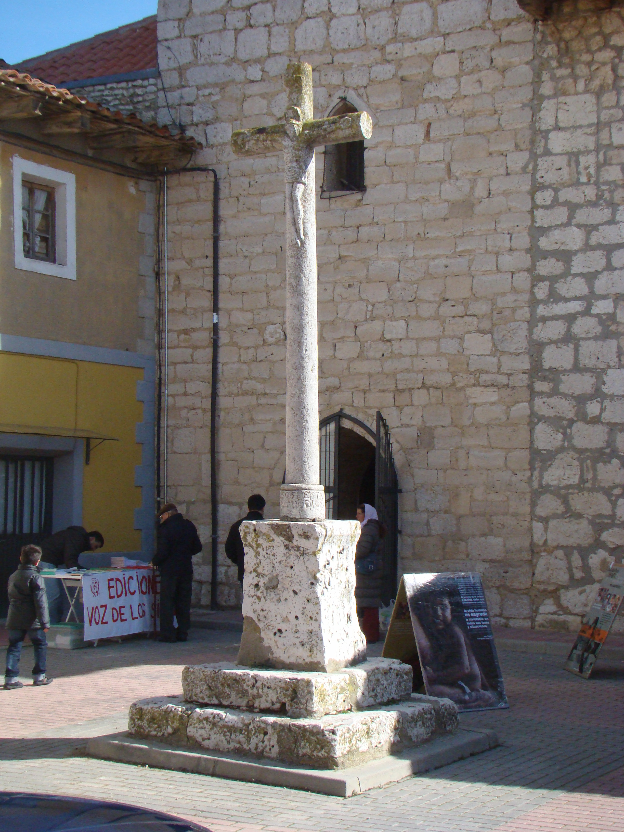 Iglesia parroquial de San Pedro Apóstol de la localidad de Zaratán , Valladolid, España. Es del siglo XVII. Delante hay una cruz de piedra perteneciente a un humilladero desaparecido.